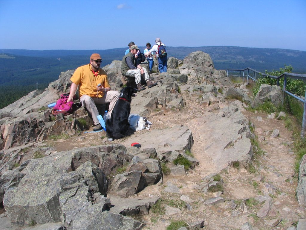 Kuppe der Achtermannshöhe